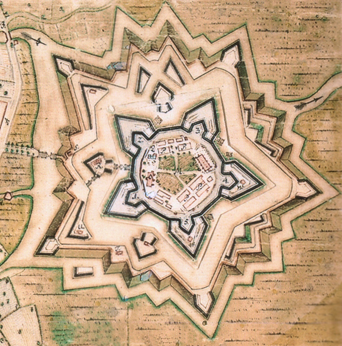 Zitadelle Vechta